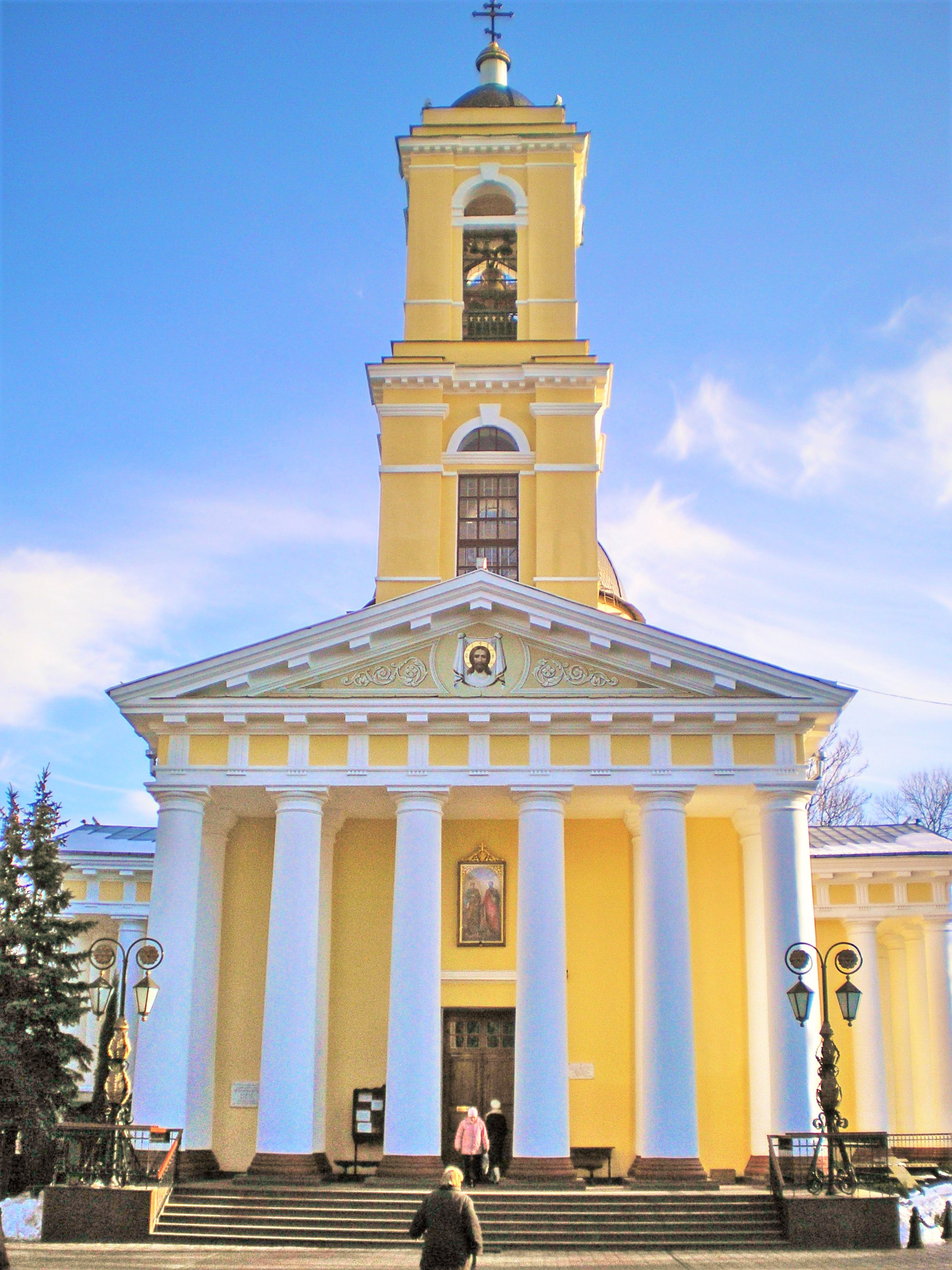 Orthodox church of Stt. Peter and Pavel. GomelКафедральный Петропавлавский собор в Гомеле